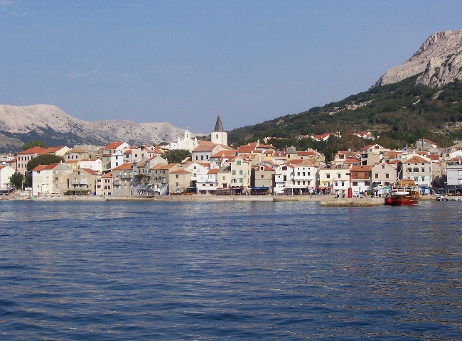 Cittadina di Baska